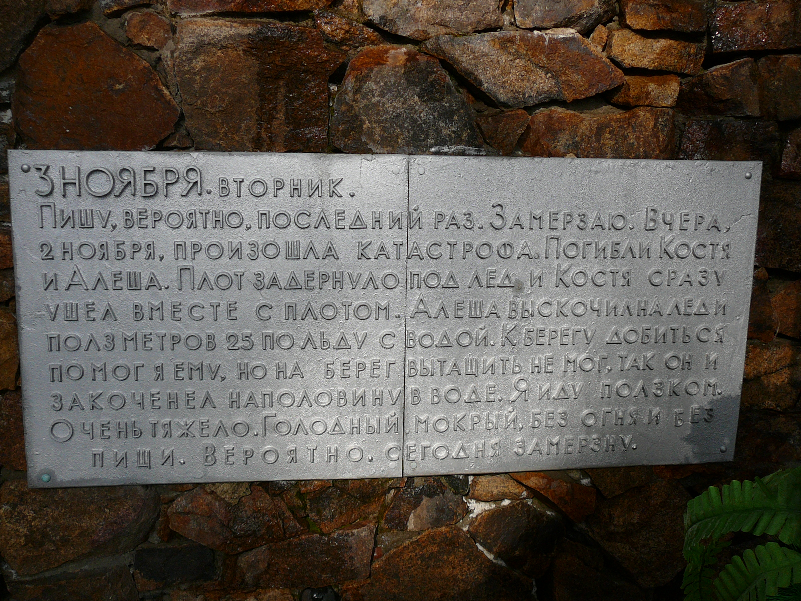 Text of letter, founden from frozen engener Alexander Korshunnikov.